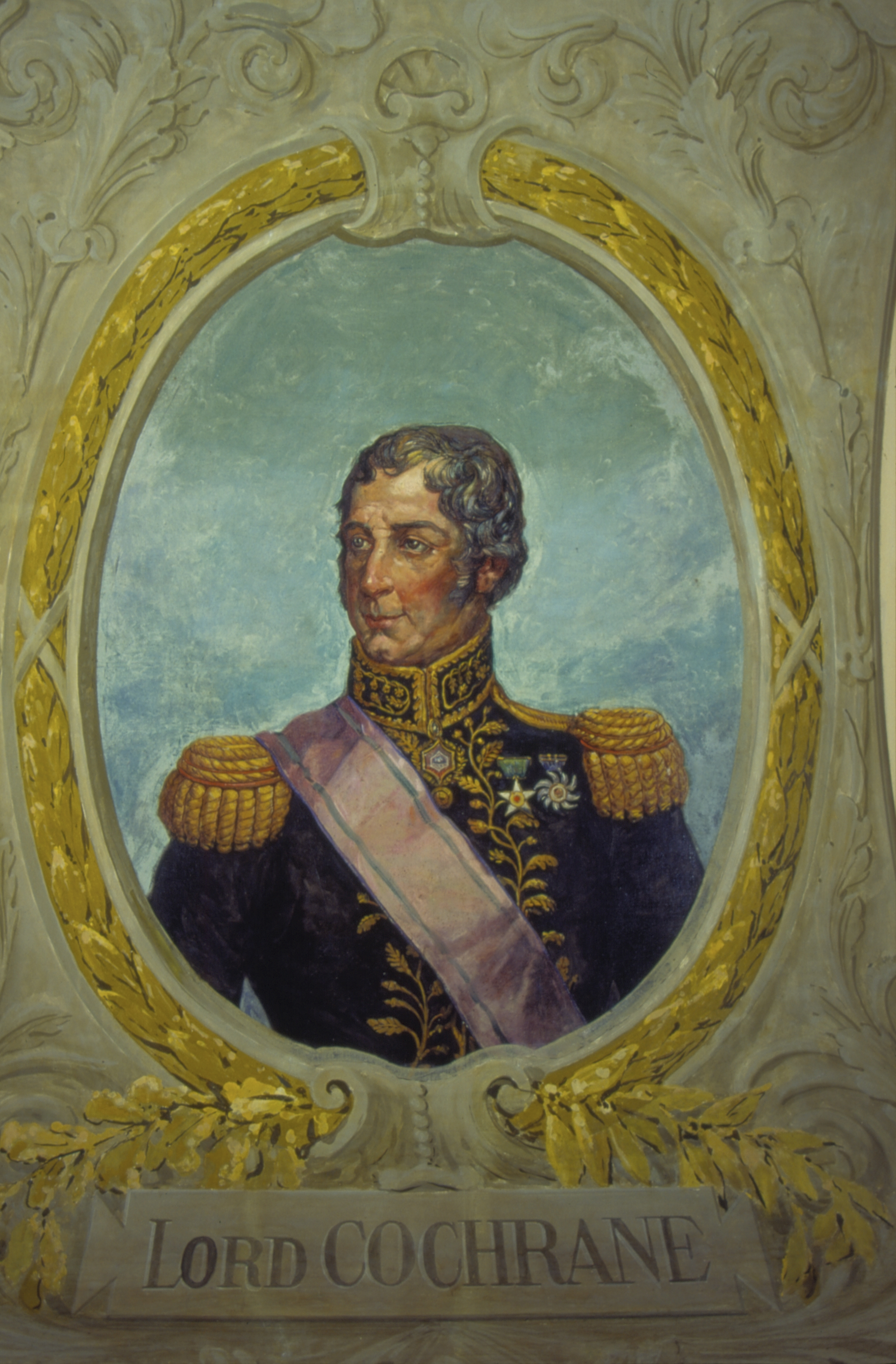 Obra que integra o acervo do Museu Paulista da USP.